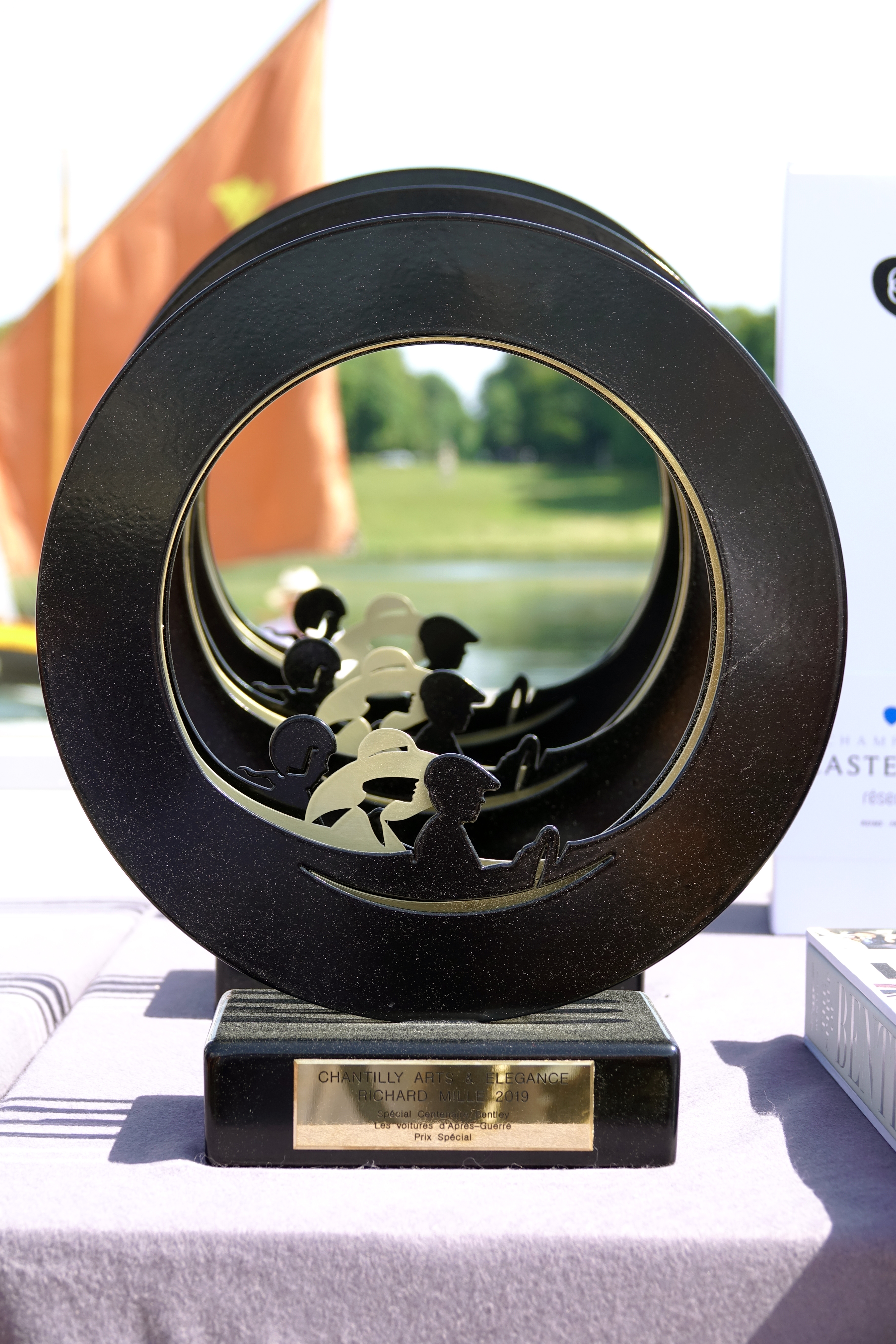 Trophée du Chantilly Arts & Elegance Richard Mille 2019